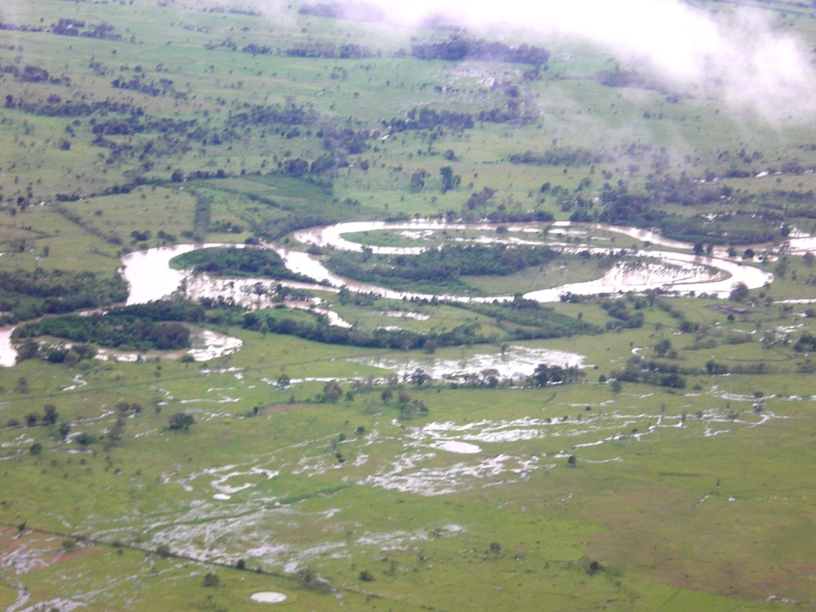 Fotografía del Río Atrato en Colombia desde helicóptero.